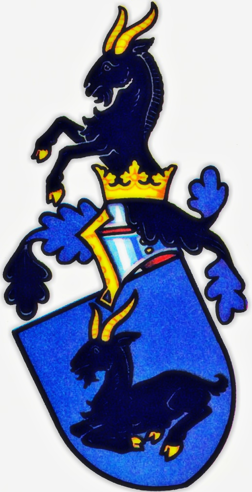 Klenovští ze Ptení